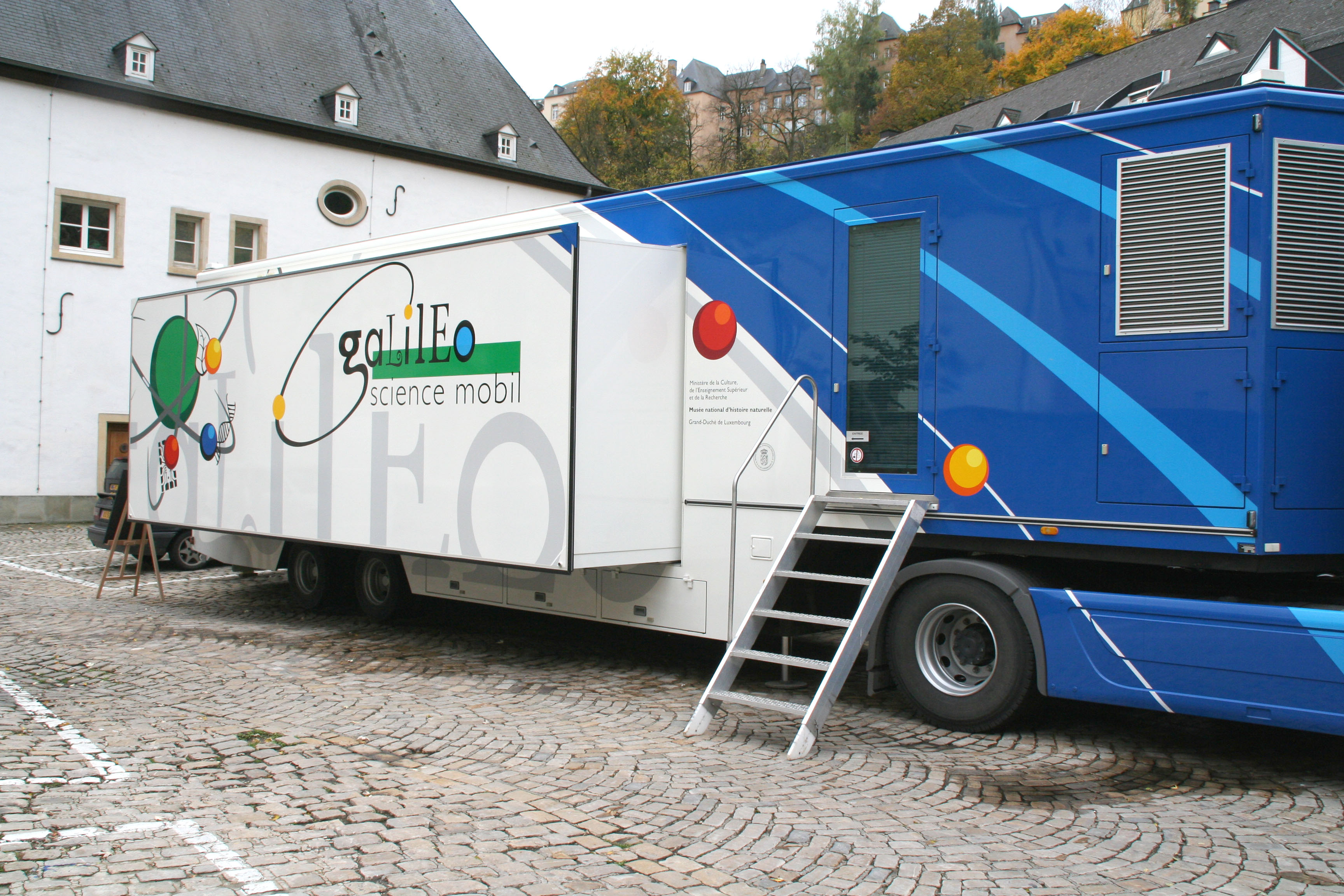 Gelileo Science Mobil 101.